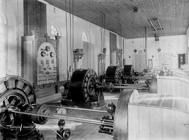 Interiör av Hellsjö kraftstation, Sveriges första trefasanläggning, 1895. Foto: Albin Andersson